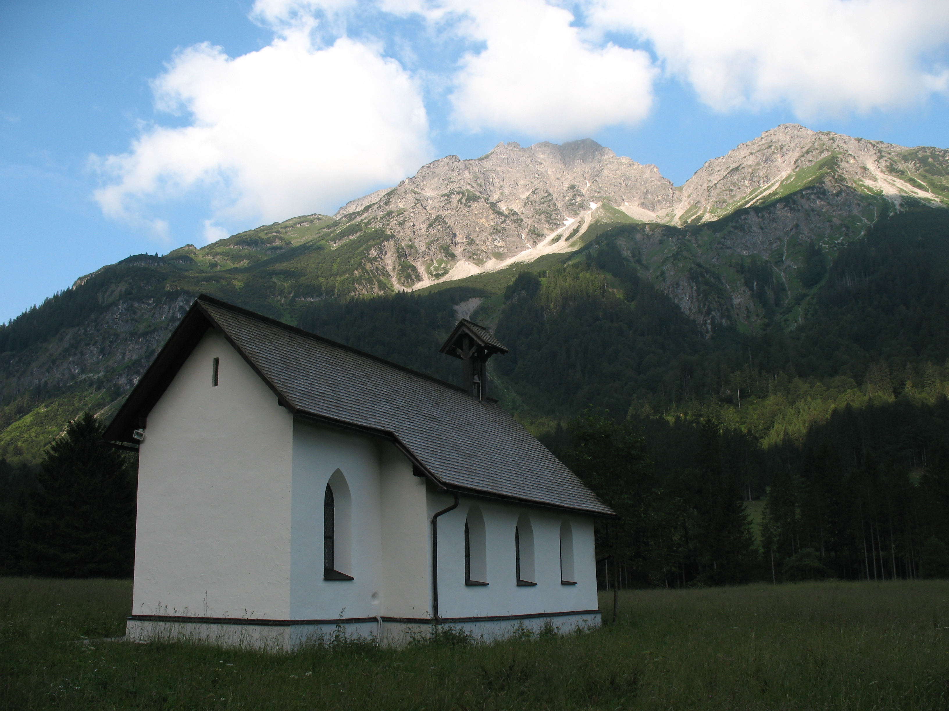 Blick auf die Kapelle Birgsau und nach Westen zum Alpgundkopf (2177 m) und Griesgundkopf (2164 m).